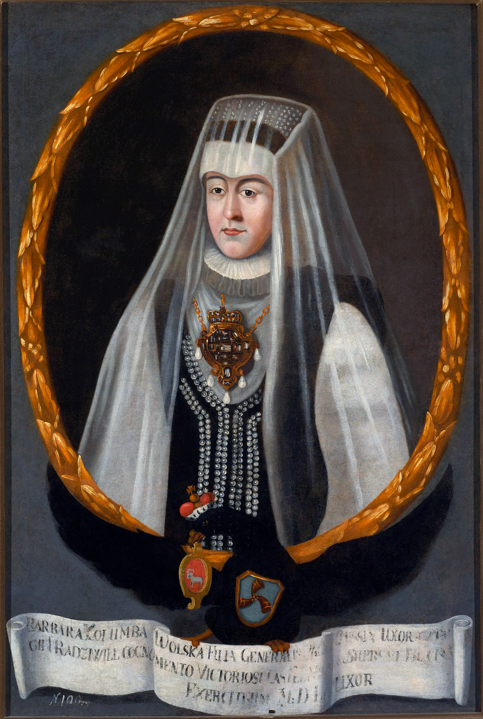 Беларуская (тарашкевіца): Партрэт Барбары Радзівіл (Barbara Radzivił) з Колаў (Koła)